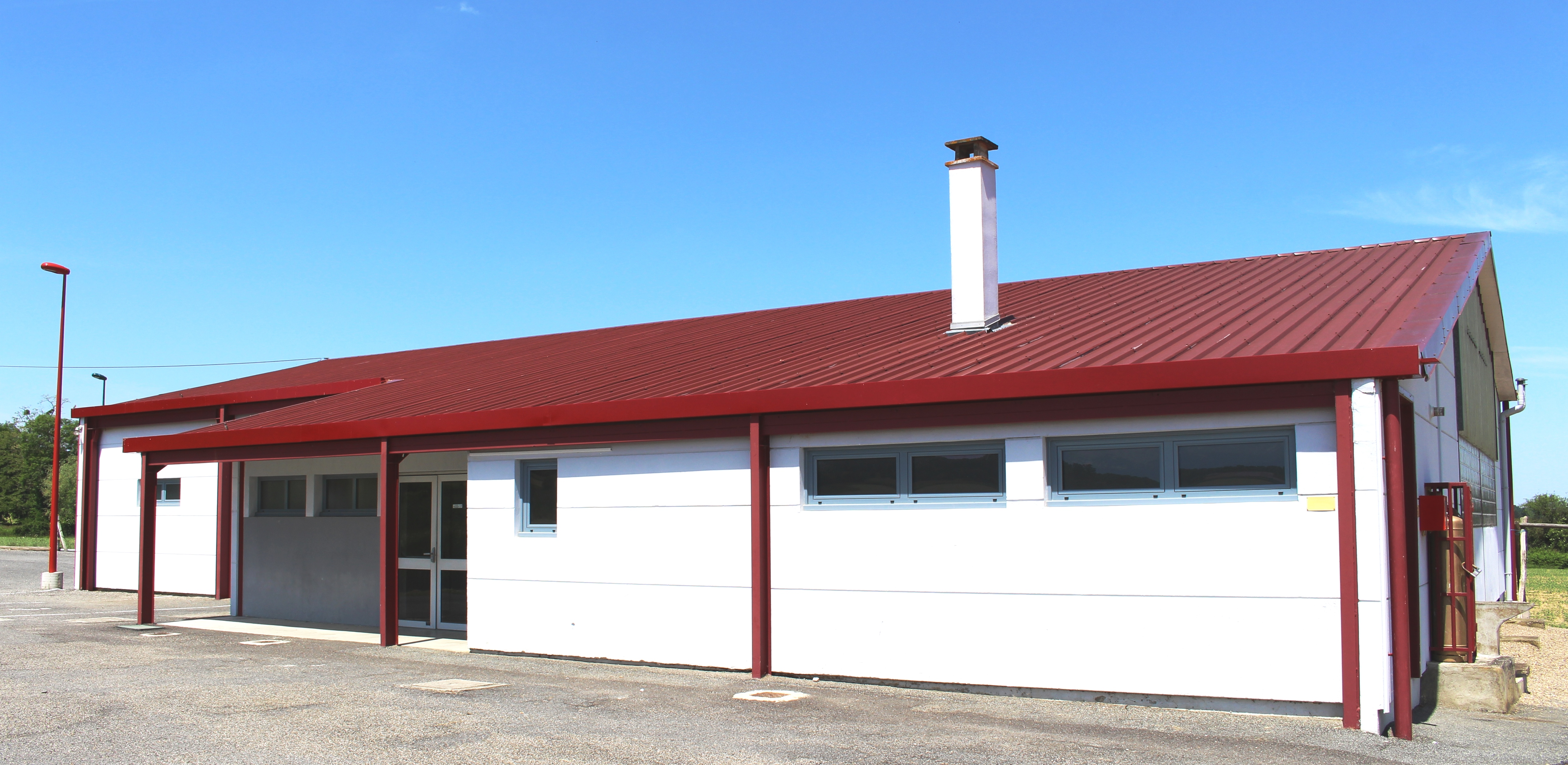 Salle des fêtes de Louit (Hautes-Pyrénées)